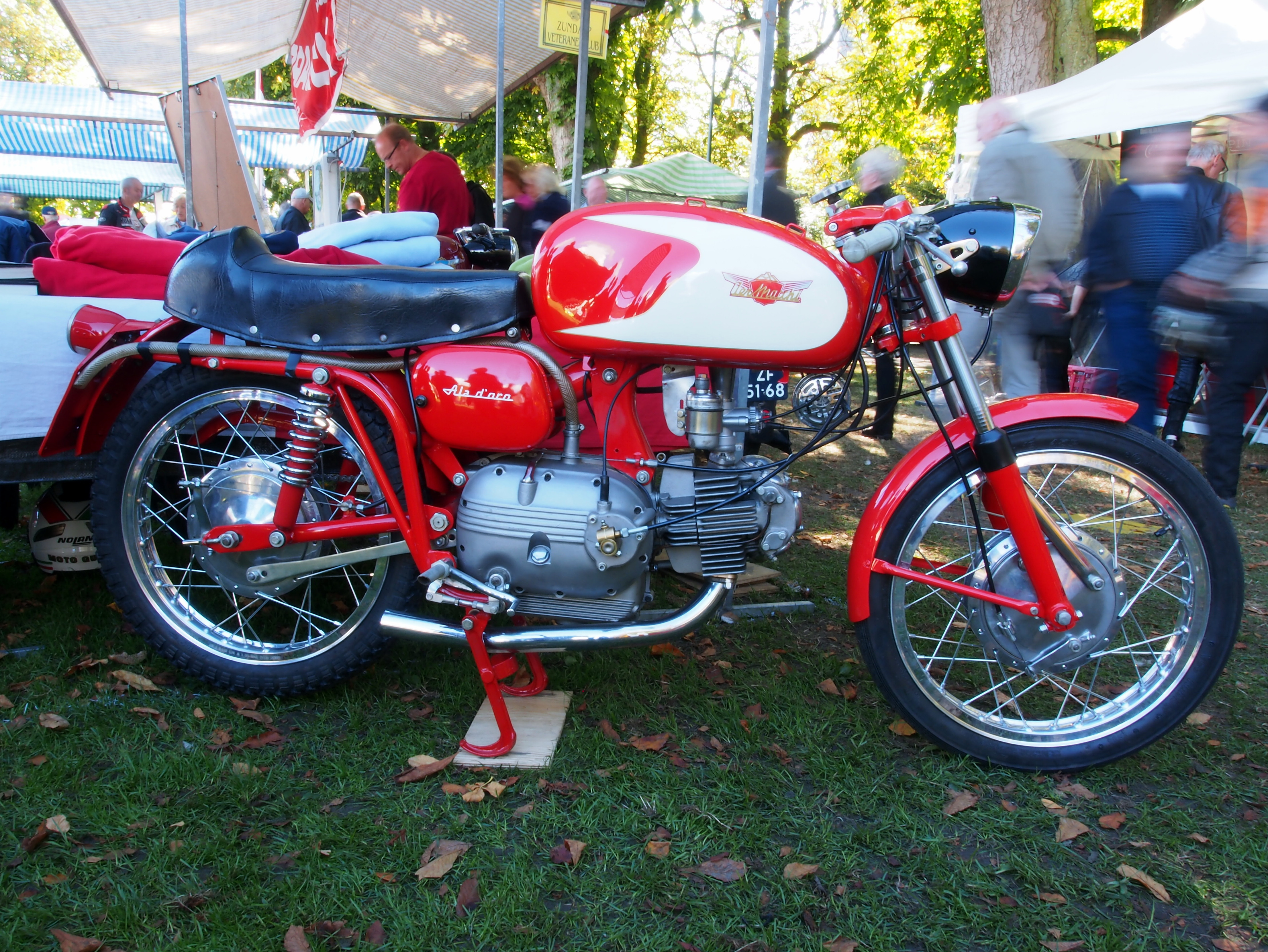 Aermacchi Ala D'oro